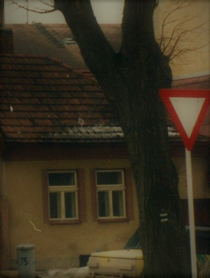 Rrodný dům Vojtěcha Bělohrobského v Černovicích u Tábora, Mariánské náměstí čp. 240.